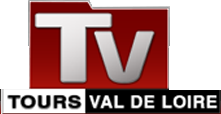 LOGO CHAINE